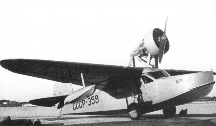 Shavrov Sh-7